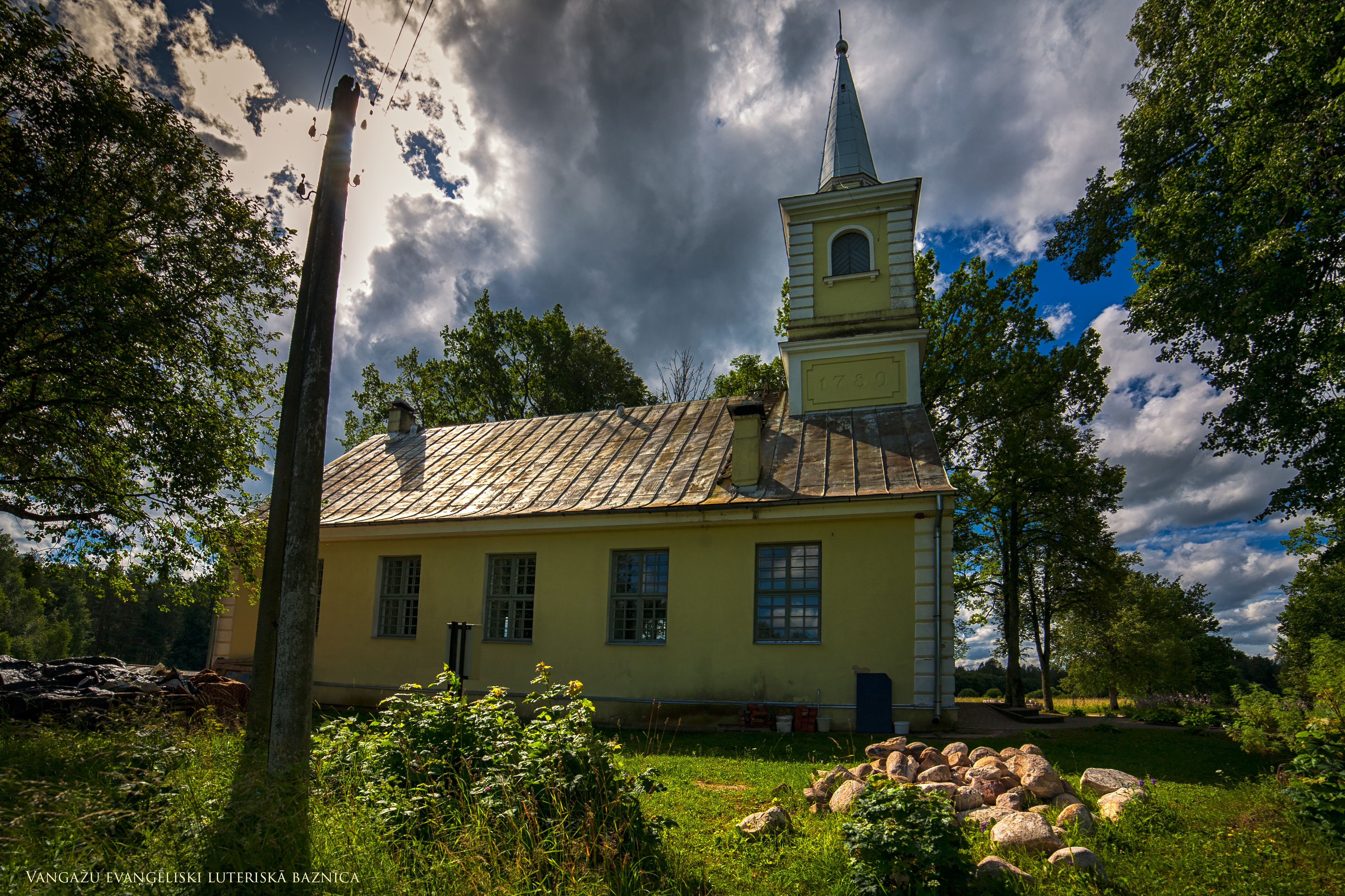 Vangažu luterāņu baznīca, Inčukalna pagasts